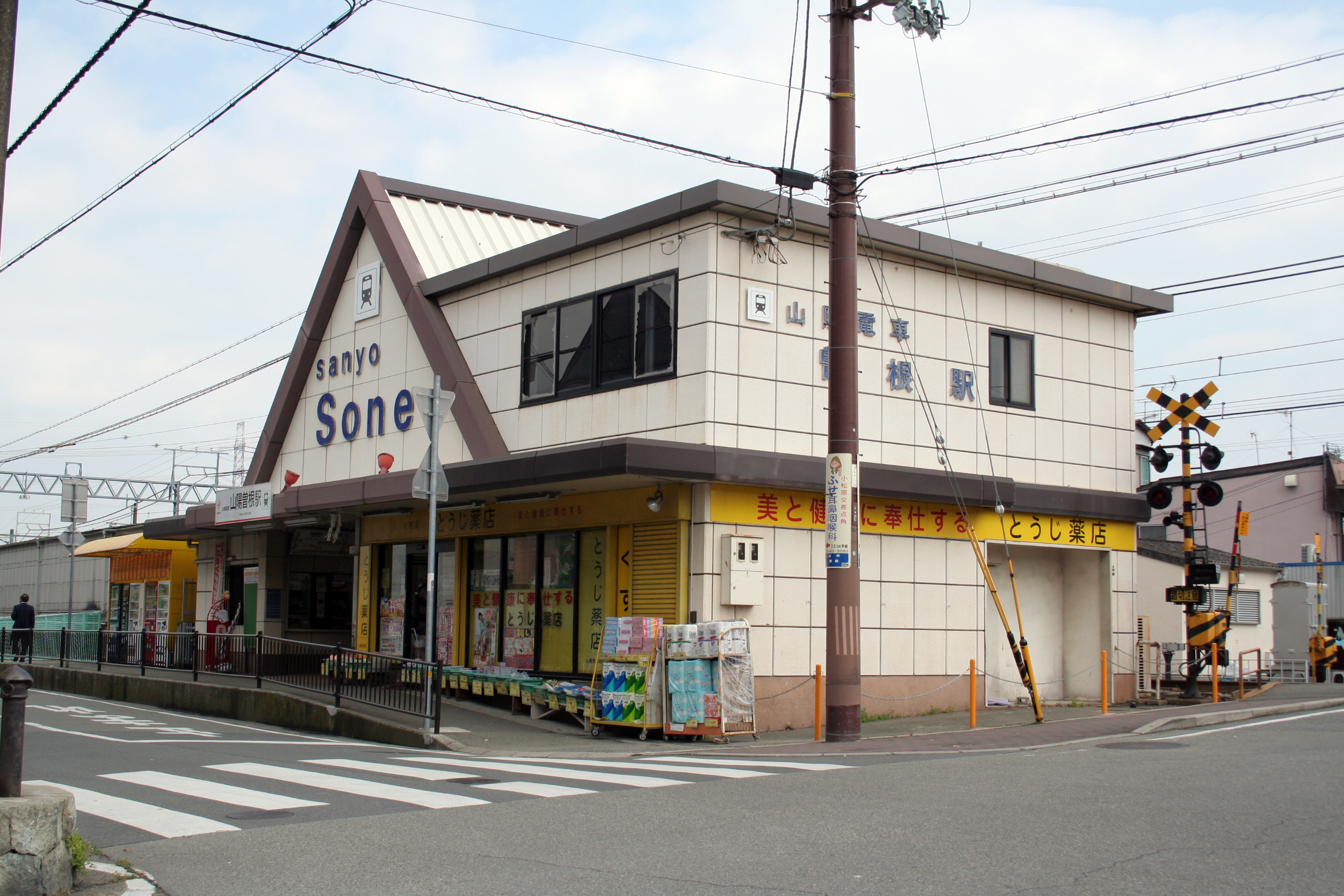 山陽曽根駅。兵庫県高砂市にある山陽電気鉄道の駅。 駅舎を北東から撮影。